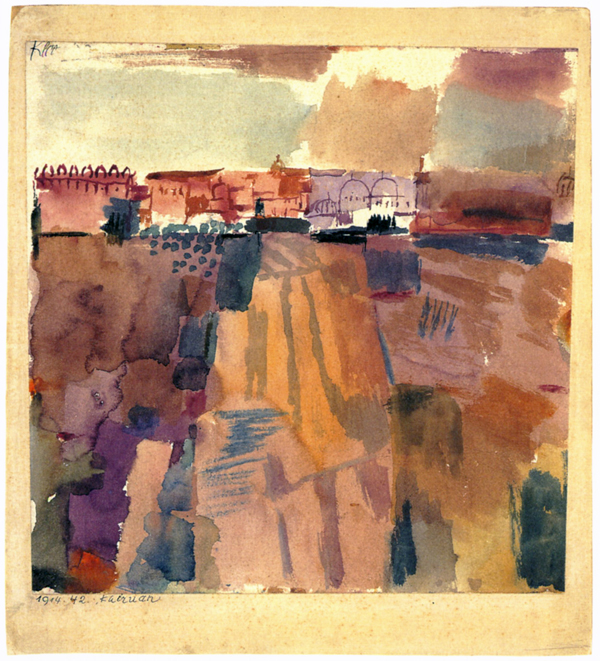 Kairuan 1914.42, 1914, Aquarell auf Papier; Ulmer Museum, Ulm